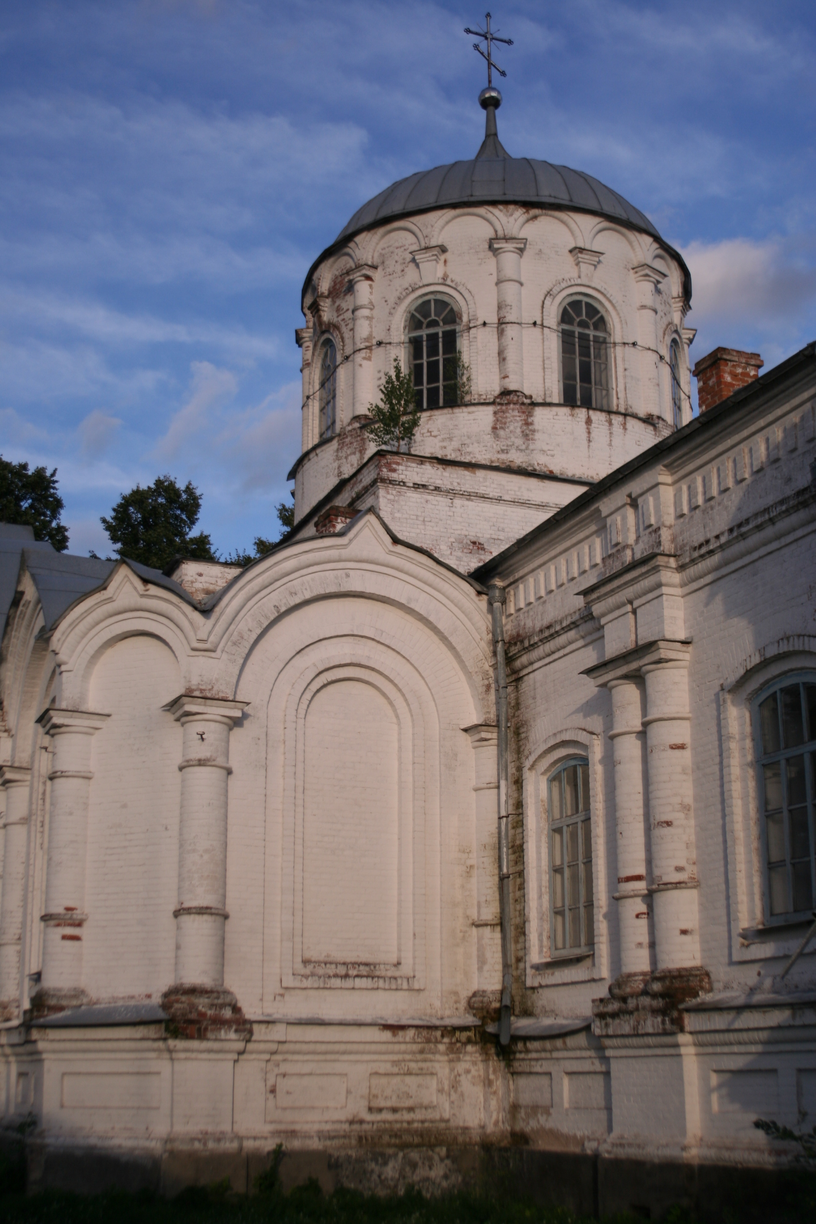 Михайлівська церква у Комарівці Борзнянського р-ну Чернігівської обл.